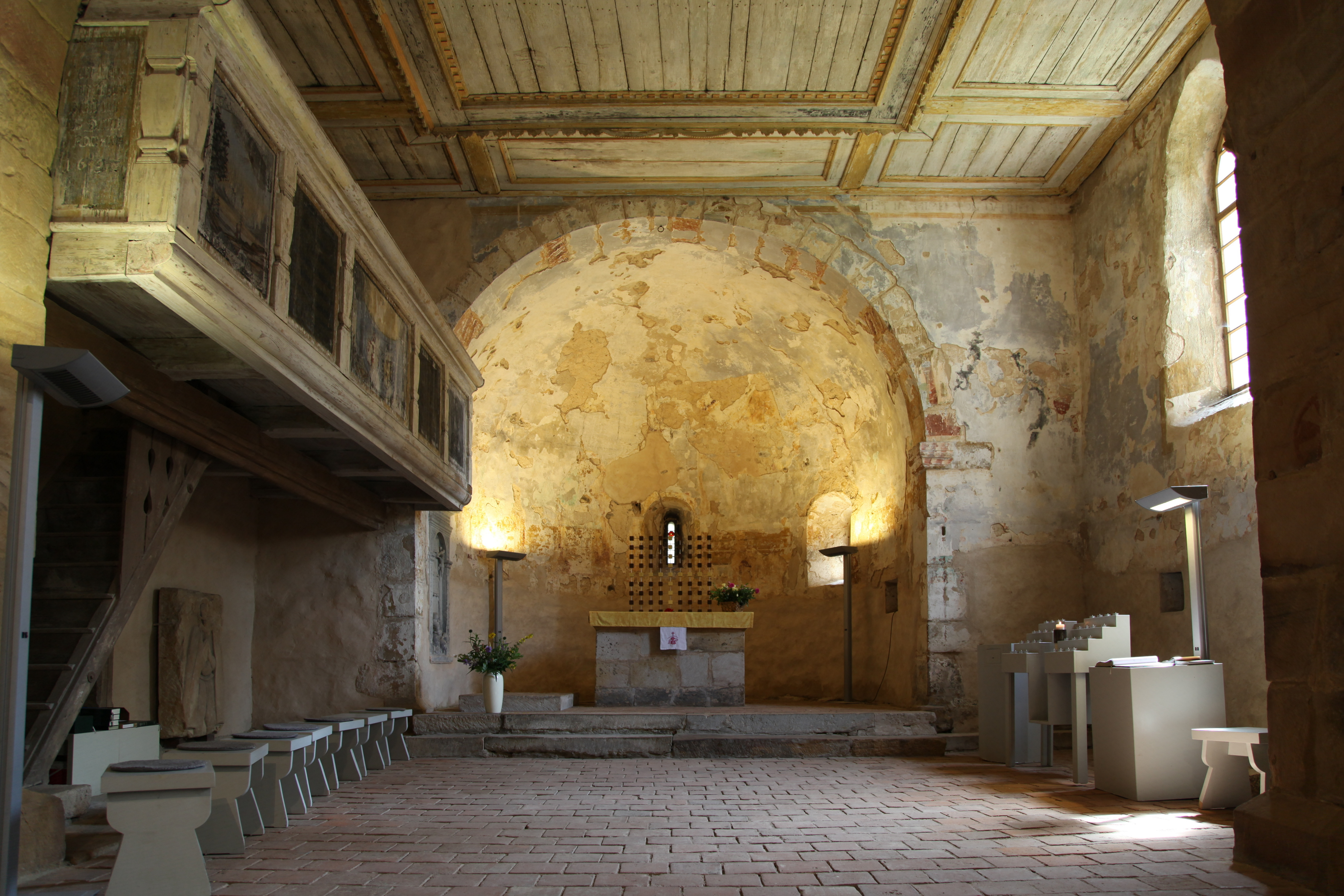 Jakobikirche, Am Ehrenfriedhof in Wilsdruff